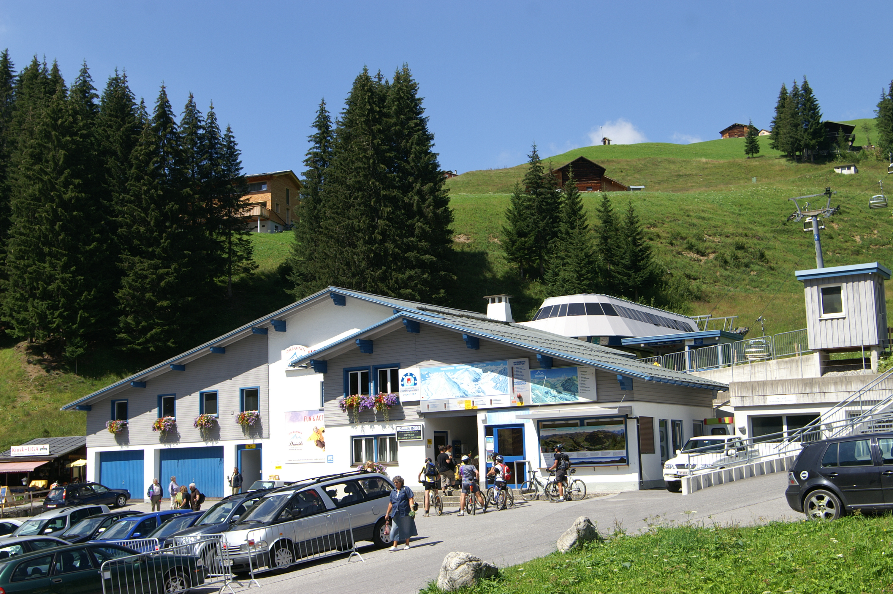 Damüls, Talstation Uga-Express.